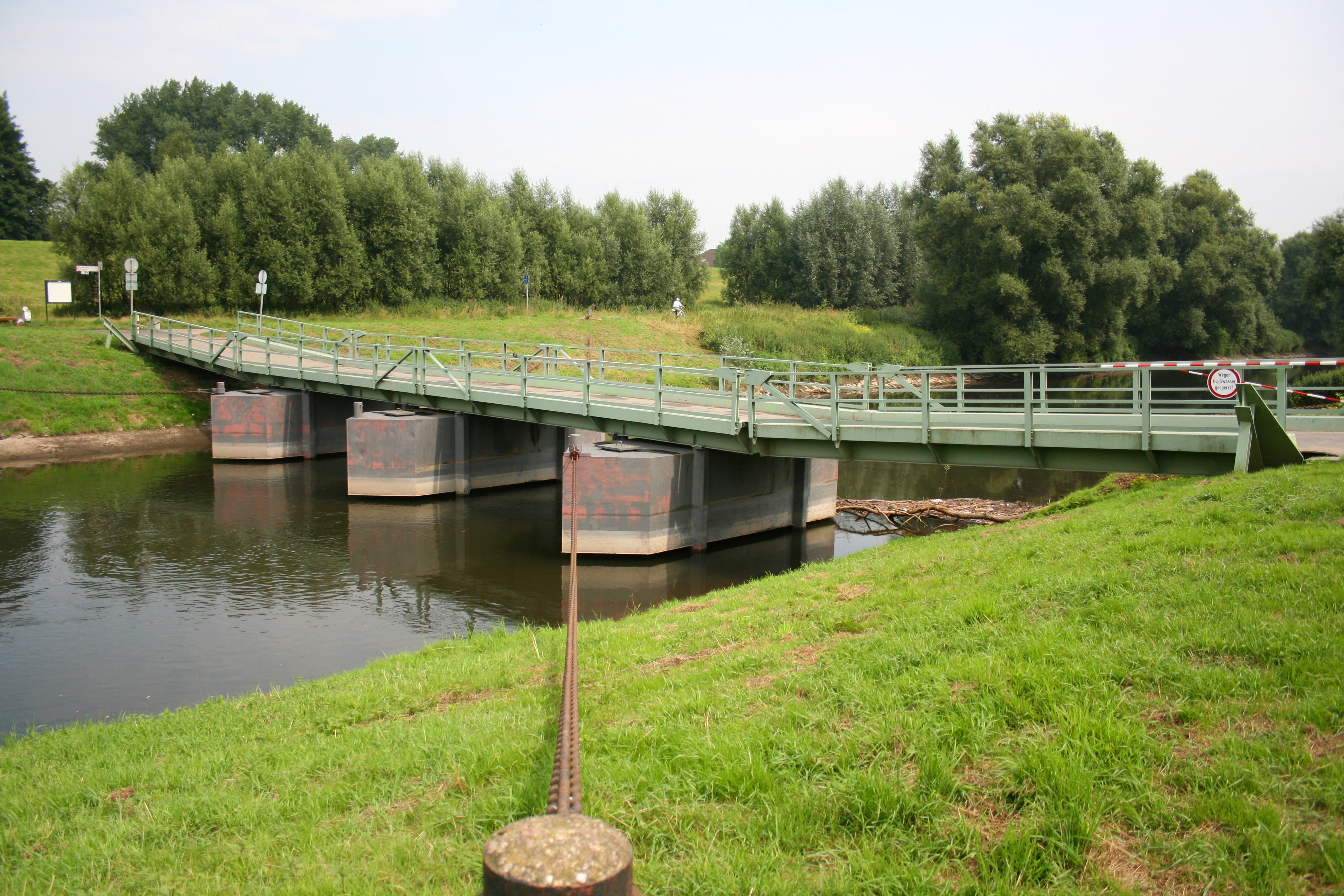 Schwimmbrücke Rheindorf über die Wupper in Leverkusen